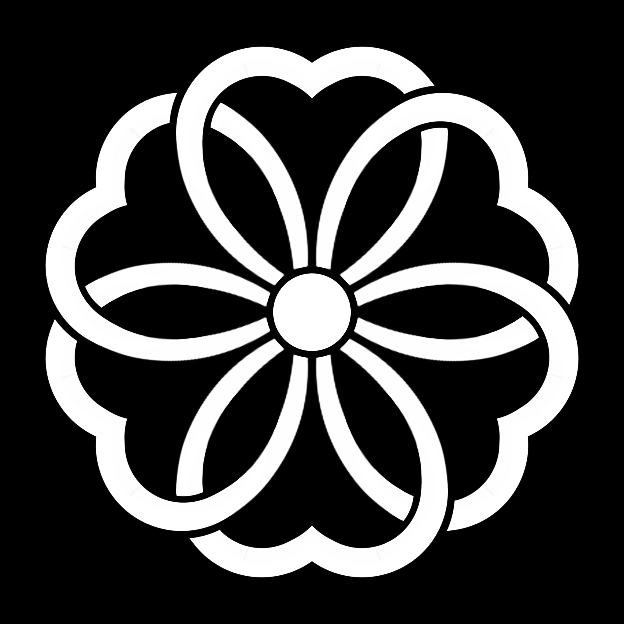 「結び八重片喰」紋（染抜）